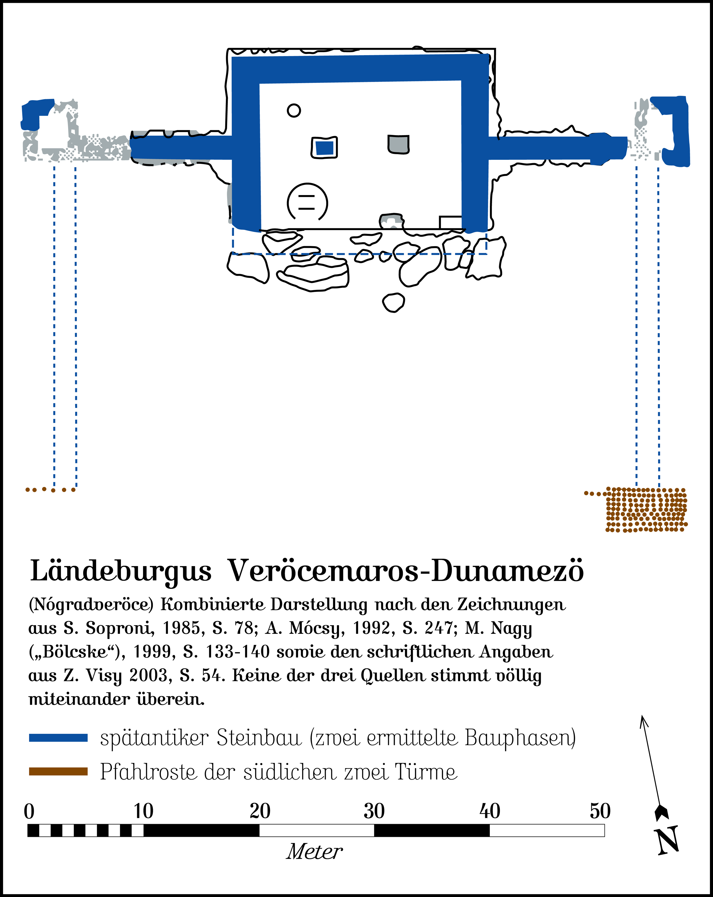 Der spätrömische Brückenkopf Verőcemaros-Dunamező (Nógrádverőce) am Donaulimes nach den Grabungen von István Paulovics, 1934. Quellen: Kombinierte Zeichnung aus: Sándor Soproni: Die letzten Jahrzehnte des pannonischen Limes. C. H. Beck, München 1985, ISBN 3406304532, S. 78; András Mócsy: Pannonien und das römische Heer. Ausgewählte Aufsätze. Franz Steiner Verlag, Stuttgart 1992, ISBN 3515061037, S. 247; Mihály Nagy: A pannoniai IV. századi burgus-típusok méretei. In: Pannoniai Kutatások. A Soproni Sándor emlékkonferencia előadásai. Bölcske, 1998 október 7. Wosinsky Mór Múzeum, Szekszárd, 1999. S. 133–140 und den textlichen Daten aus Zsolt Visy: The ripa Pannonica in Hungary. Akadémiai Kiadó, Budapest 2003, ISBN 9630579804, S. 54. Gezeichnet in FreeHand MX für Macintosh; abgespeichert in Adobe Photoshop CS.